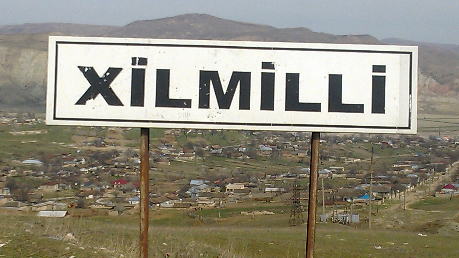 Hilmilli — Azərbaycan Respublikasının Qobustan rayonunun inzibati ərazi vahidində kənd.